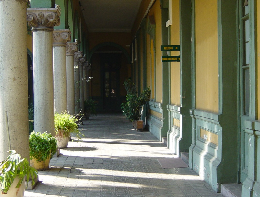 El Hospital del Salvador, es uno de los más antiguos de Chile